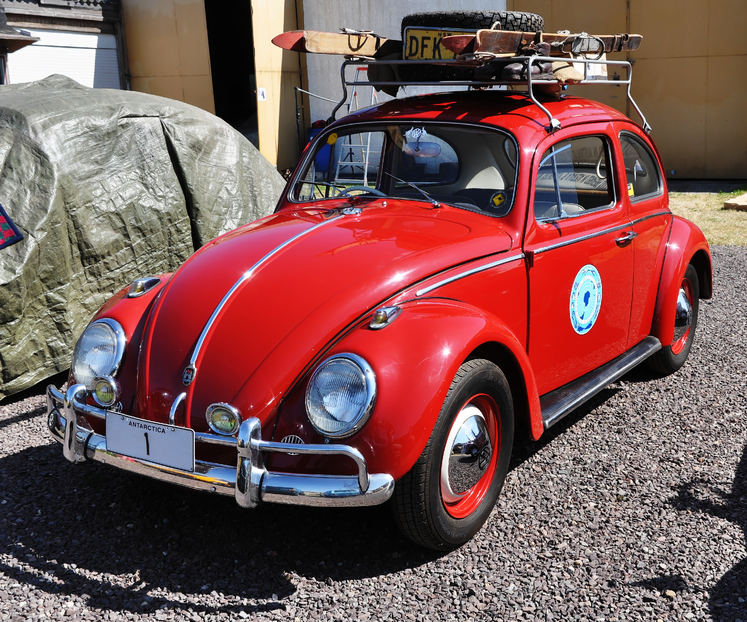 Sammlung Historischer Fahrzeuge Braunschweig 2013, detalierte Beschreibungen folgen später